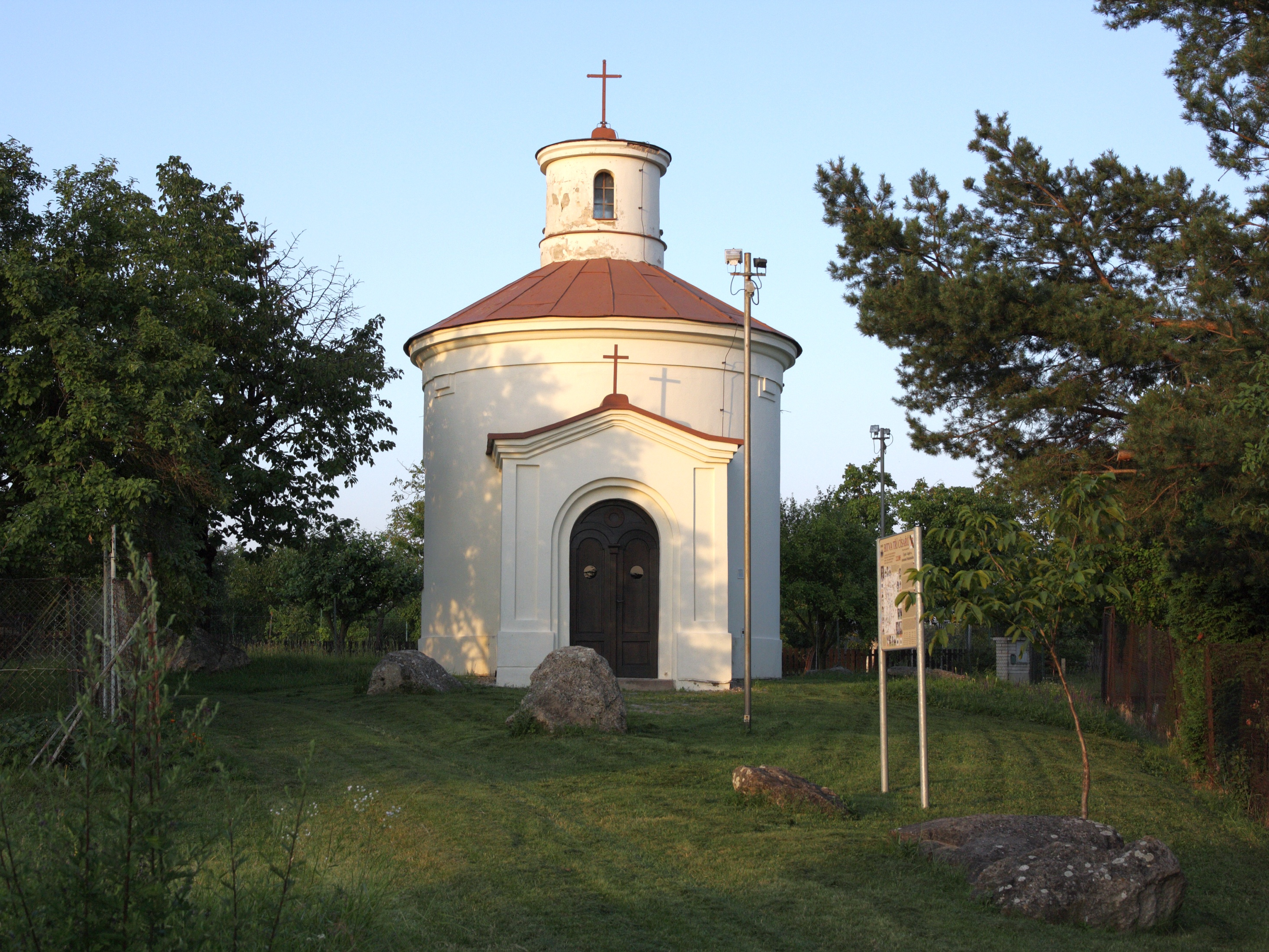 Újezd u Brna - kaple sv Antonína Paduánského.